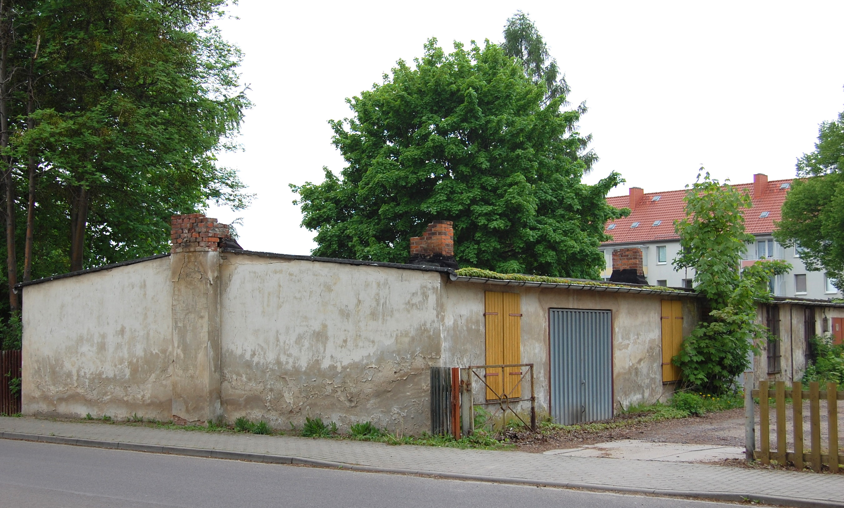 ehemalige Behelfswohnungen im Magdeburg-Fermersleben, Baujahr zwischen 1918 und 1920